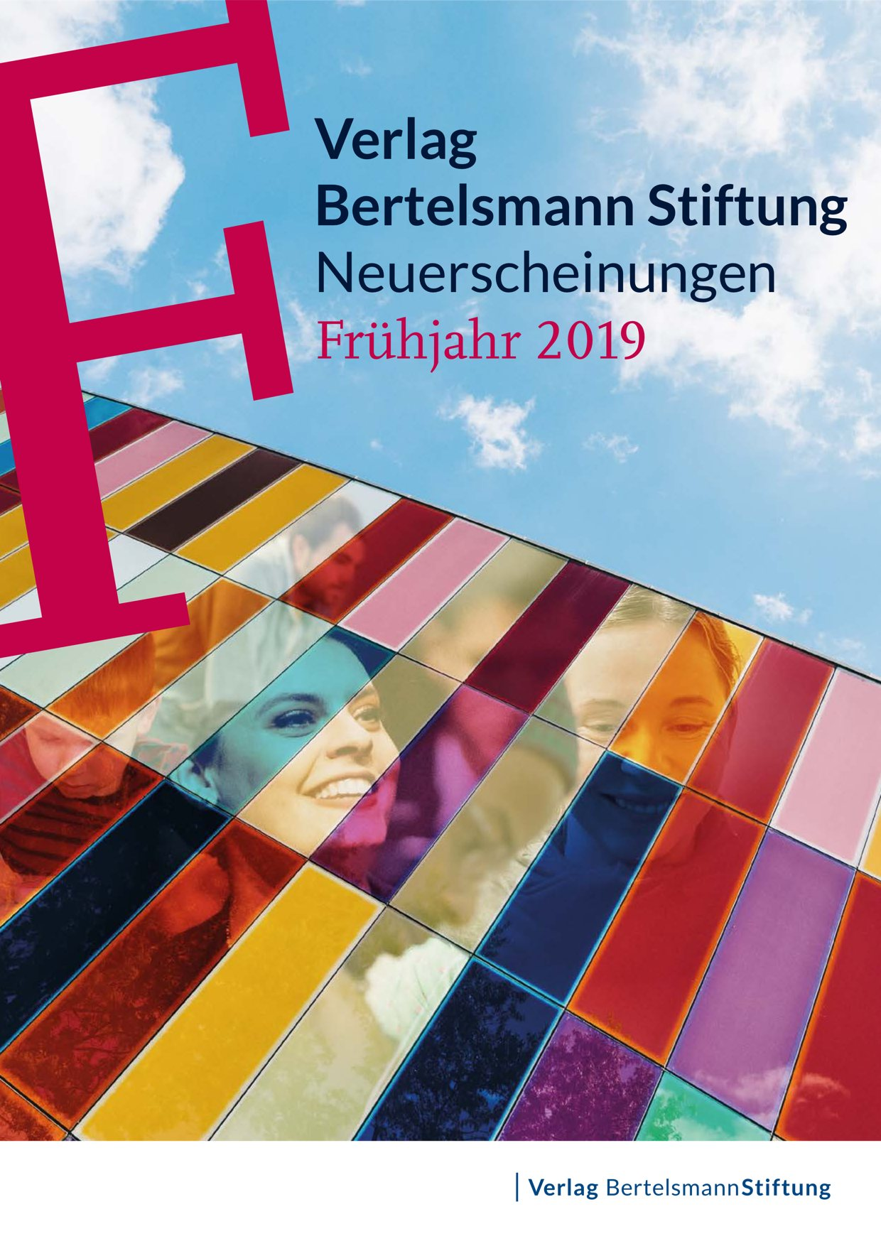 Cover der Neuerscheinungen des Verlags Bertelsmann Stiftung aus dem Frühjahr 2019